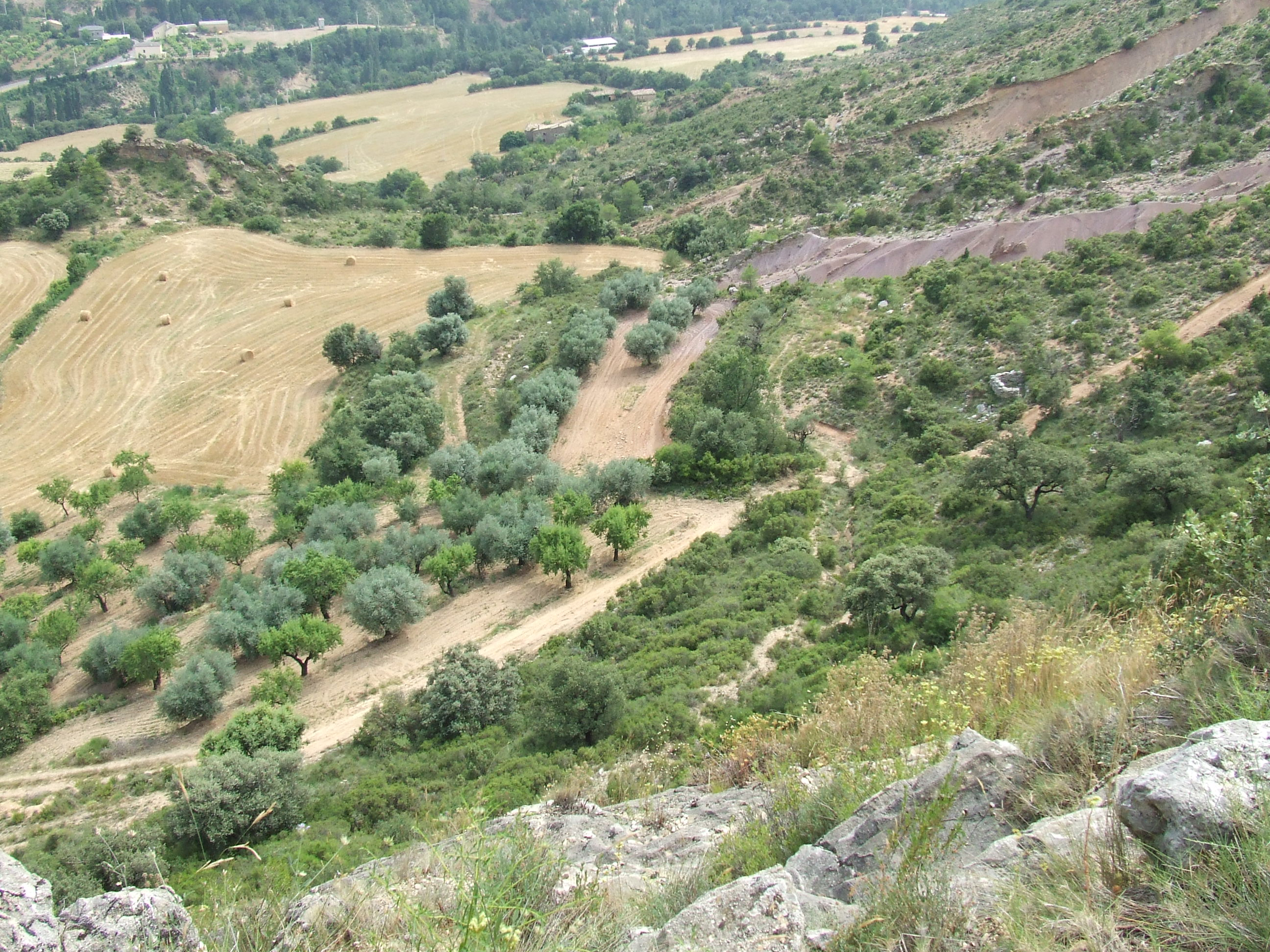 Lo Trull del Carreu (Abella de la Conca, Pallars Jussà)